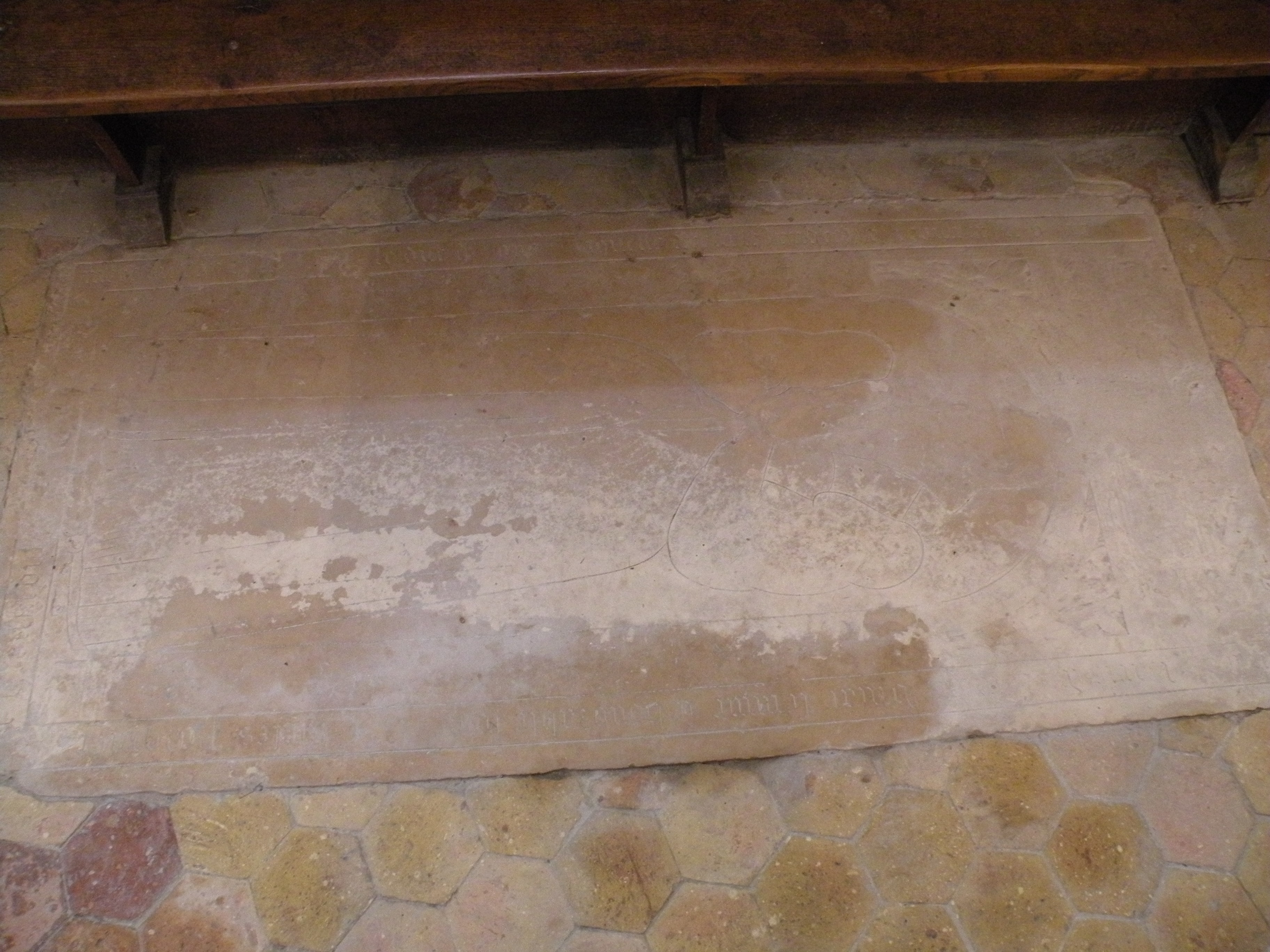 Église de Chaumont en Vexin pierre tombale